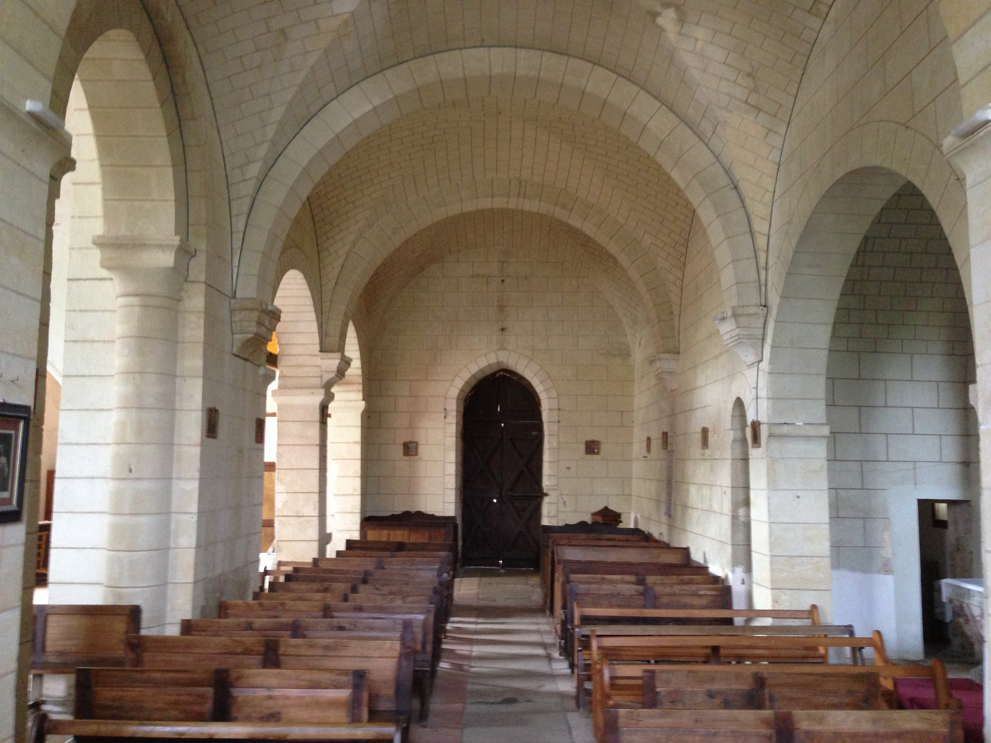 Nef de l'église de Cheillé (XIIe siècle), Indre-et-Loire.